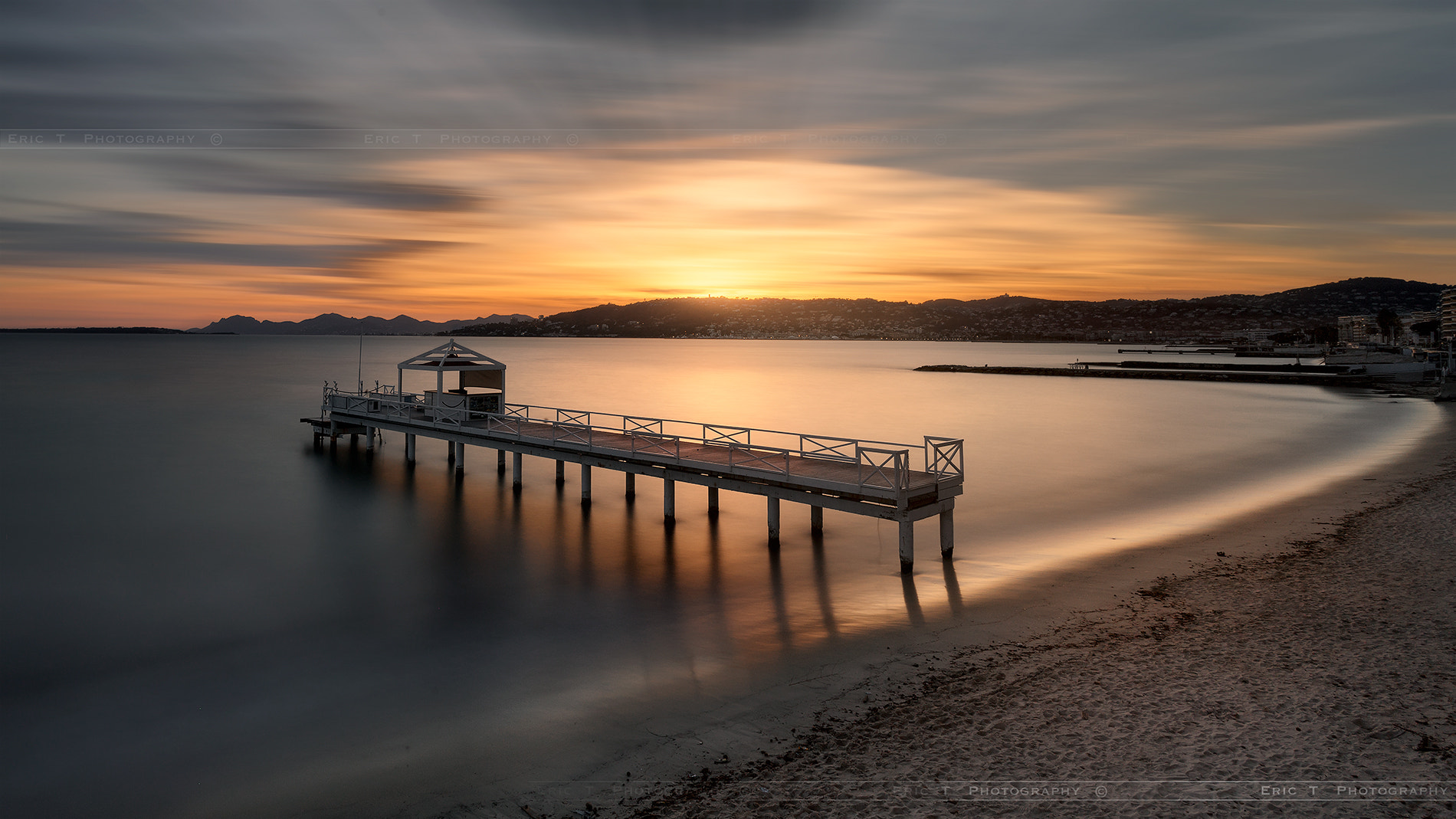 500px provided description: Sunset Ponton Garden Beach Juan Les Pins France [#sky ,#landscape ,#sunrise ,#sunset ,#water ,#reflection ,#nature ,#beach ,#travel ,#night ,#sun ,#ocean ,#summer ,#evening ,#france ,#seascape ,#nightscape ,#composure ,#canon 6d ,#lon g exposition]